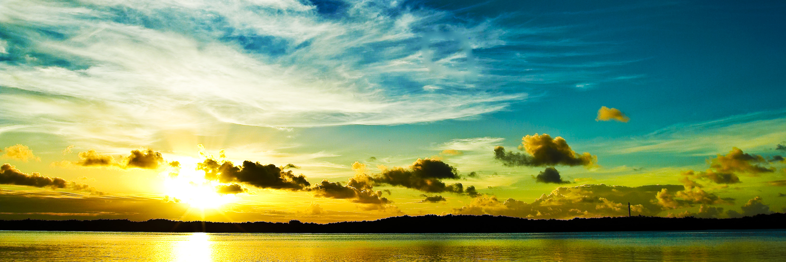 Imagem panorâmica do Rio Potengi em Natal, Rio Grande do Norte, Brasil. Panoramic image of the River Potengi in Natal, Rio Grande do Norte, Brazil. Imagen panorámica del río Potengi en la Natal, Rio Grande del Norte, el Brasil. Picture Vue d'ensemble de Rio Potengi dans le Natal, Rio Grande do Norte, Brésil. Foto panoramica di Rio Potengi a Natal, Rio Grande do Norte, Brasile. Picture Übersicht von Rio Potengi in Natal, Rio Grande do Norte, Brasilien.